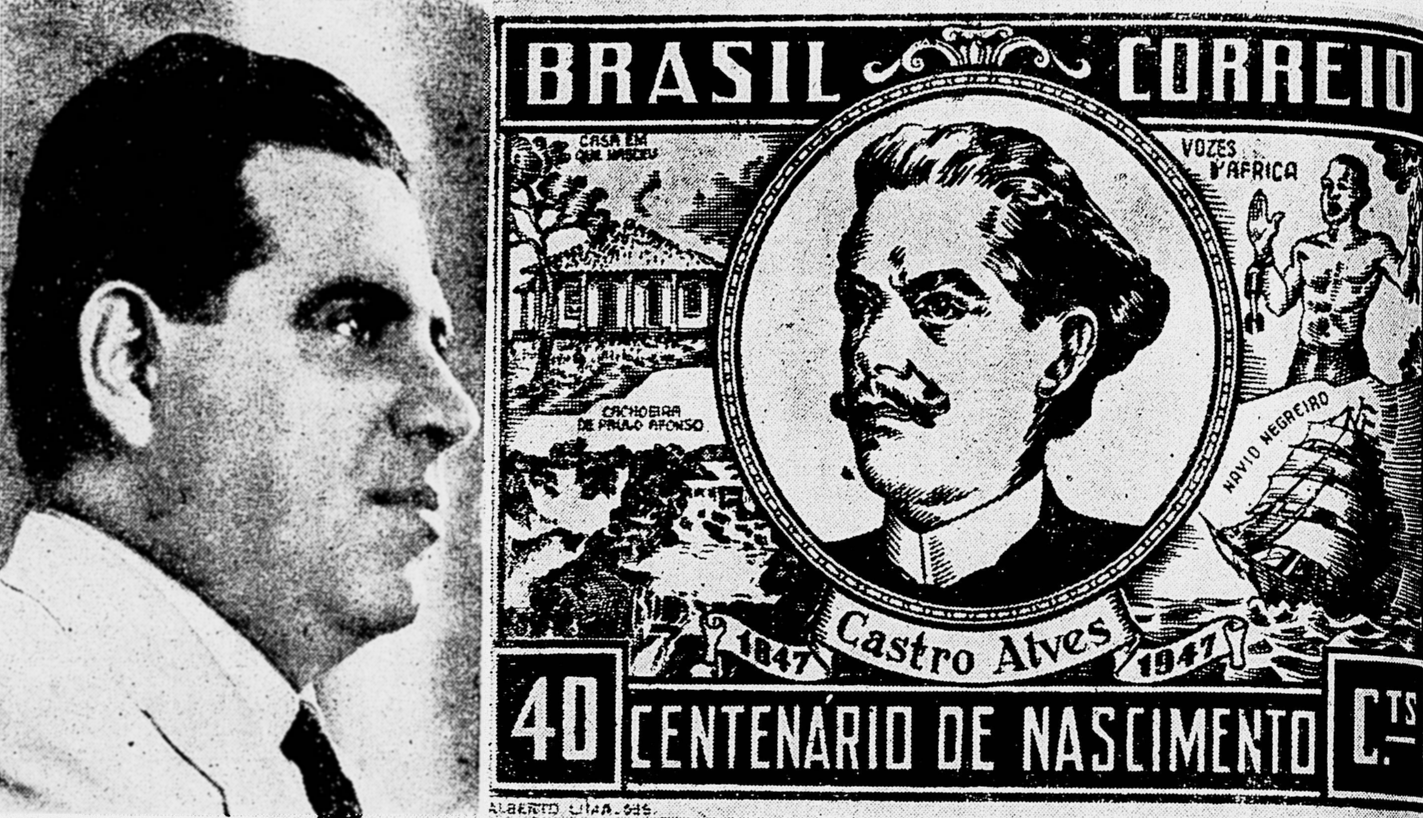 O desenhista Alberto Lima e a estampa do selo postal vencedora de concurso público do governo brasileiro em 1946 para a homenagem ao poeta Castro Alves pelo centenário de seu nascimento, em 1947.